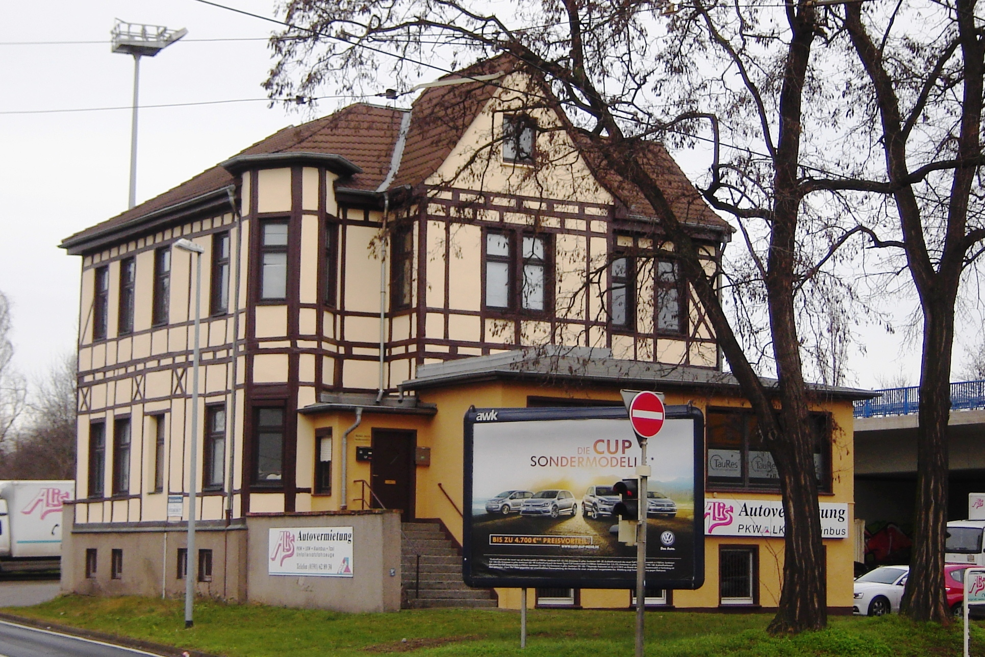 Magdeburg, Halberstädter Straße 26a (Kulturdenkmal)